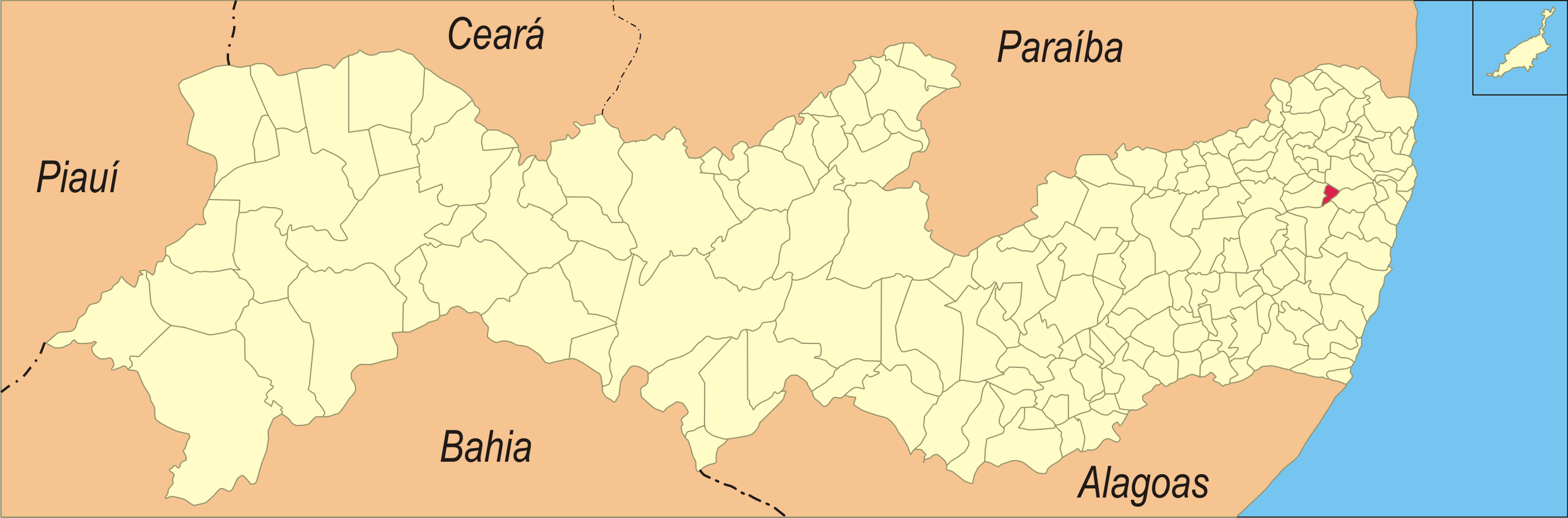 Localização da cidade em Pernambuco